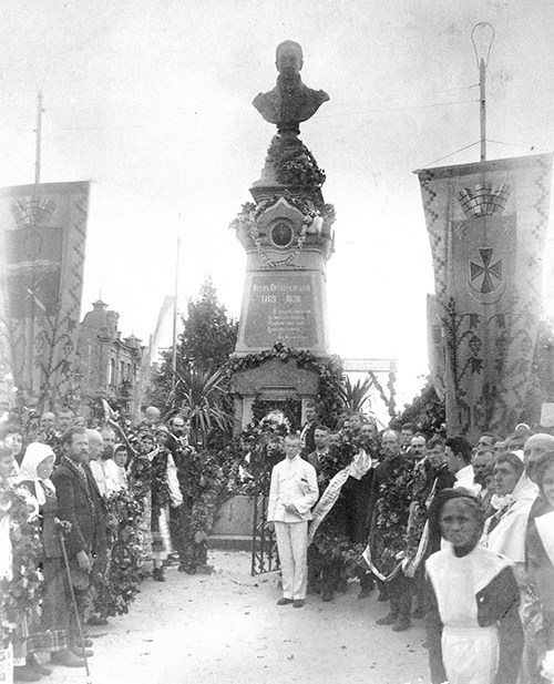 Відкриття пам'ятника І. Котляревському (Полтава 1903)